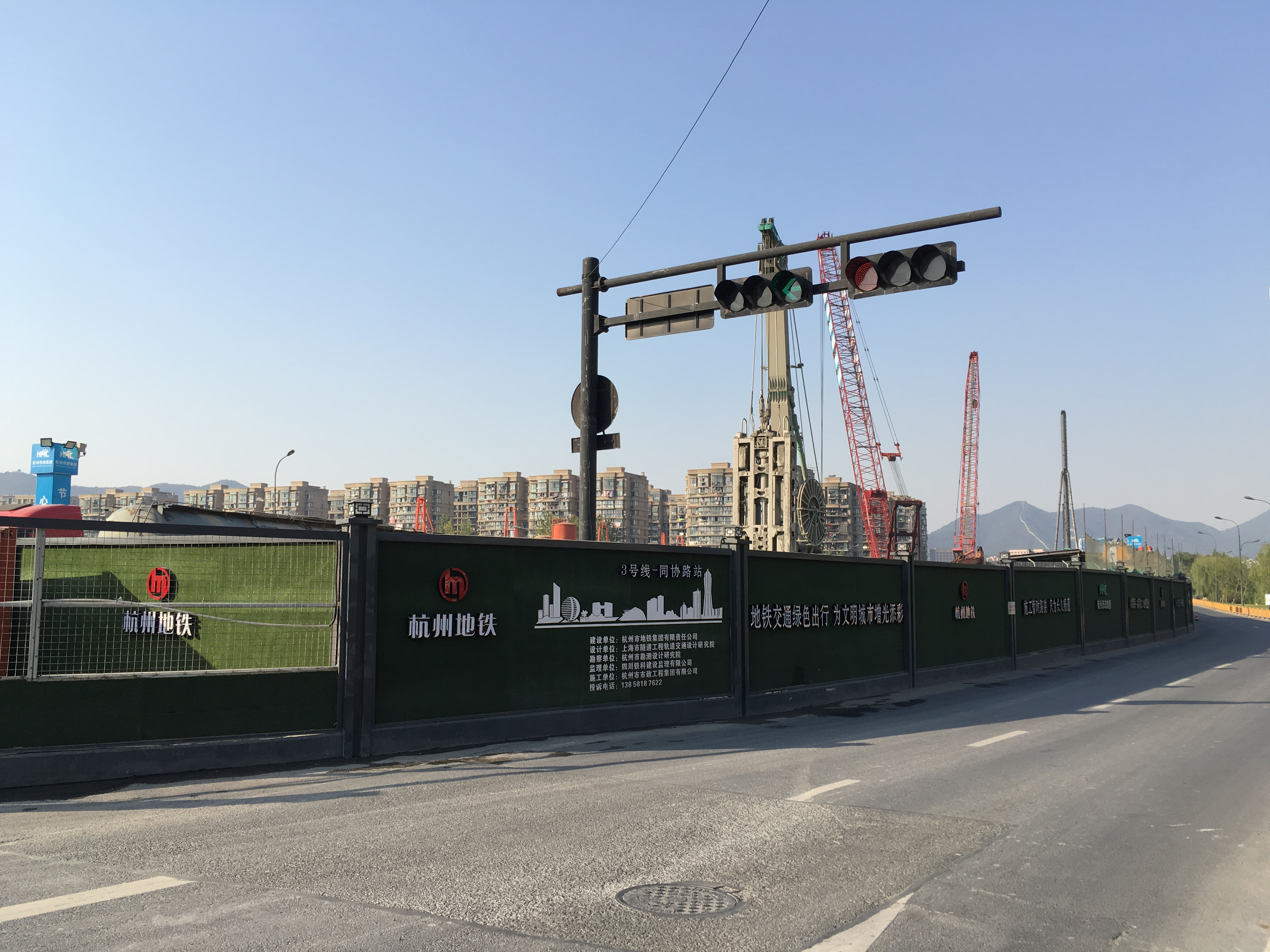 同协路站工地20181027